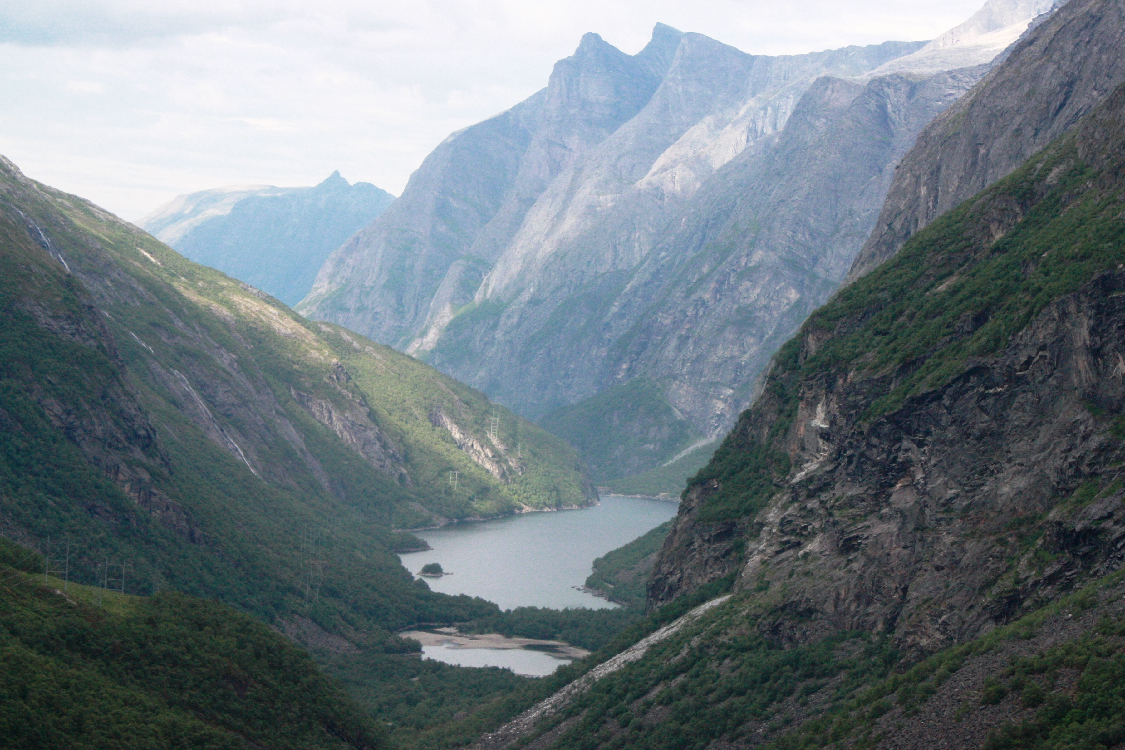 Utsikt mot Litldalen fra Aursjøvegen.